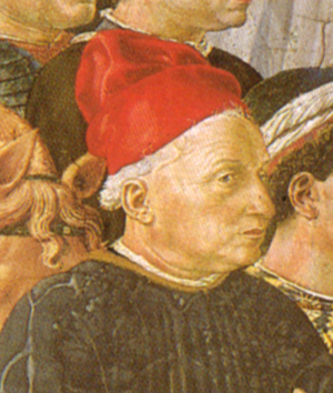 Cosimo de' Medici. detail